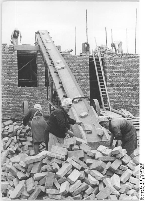 Zentralbild Funck 27.5.1952 Nationales Aufbauprogramm. Mechanisierung der Bauhilfsarbeiten in der Stalinallee. Duch die vielseitige Mechanisierung in der Bauindustrie wird es u. A. Möglich, Arbeiten, die sonst mit vieler Mühe von Huckern ausgeführt wurden, durch Maschinen verrichten zu lassen. Dadurch werden Arbeitskräfte frei, die bereits an anderer Stelle zur Erfüllung unserer Wirtschaftspläne eingesetzt werden können. UBz: Im Abschnitt D-Nord in der Stalinallee werden Ziegelsteine mit dem Förderband transportiert.